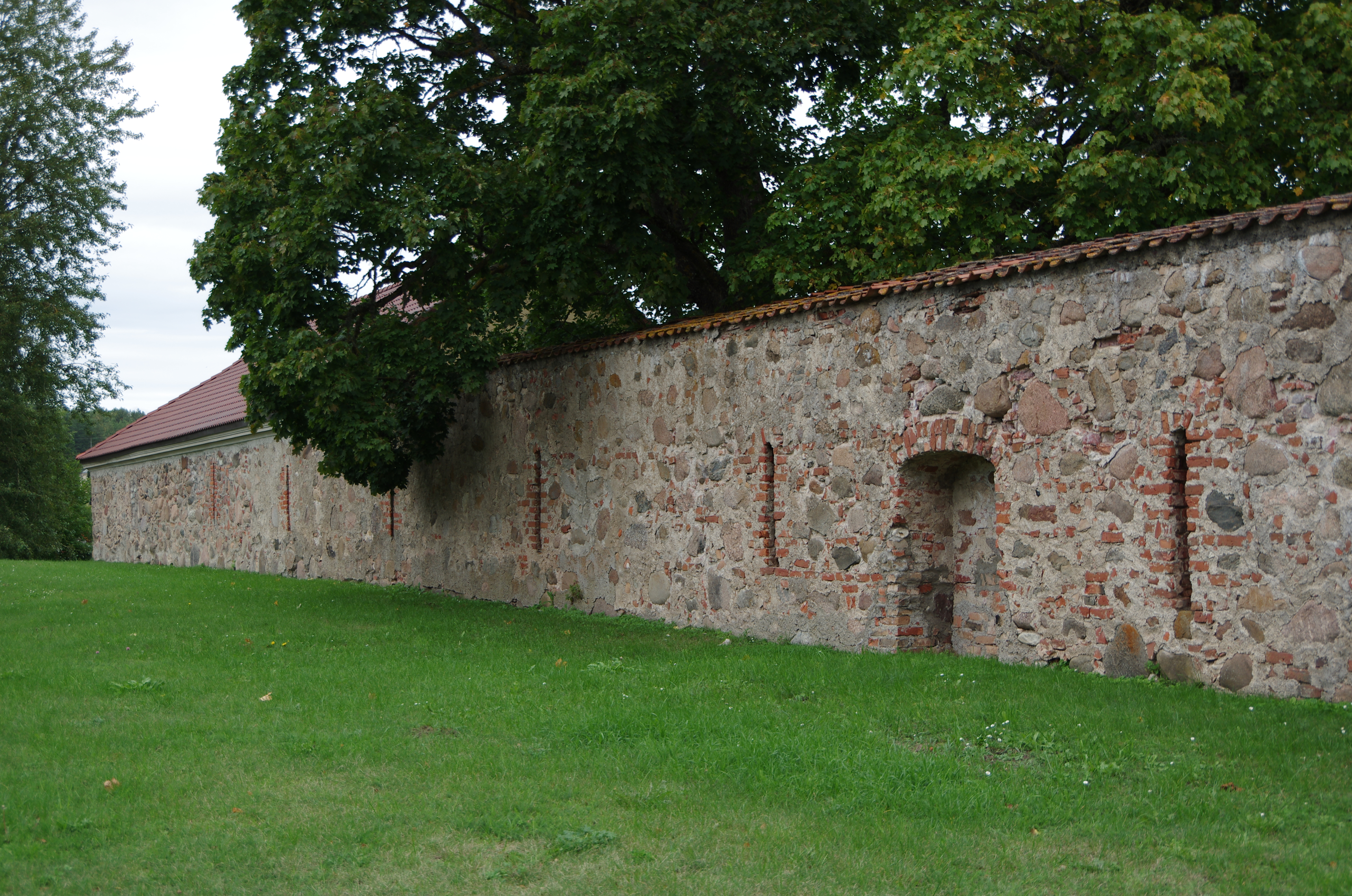 Šlokenbekas mūra siena, Milzkalne